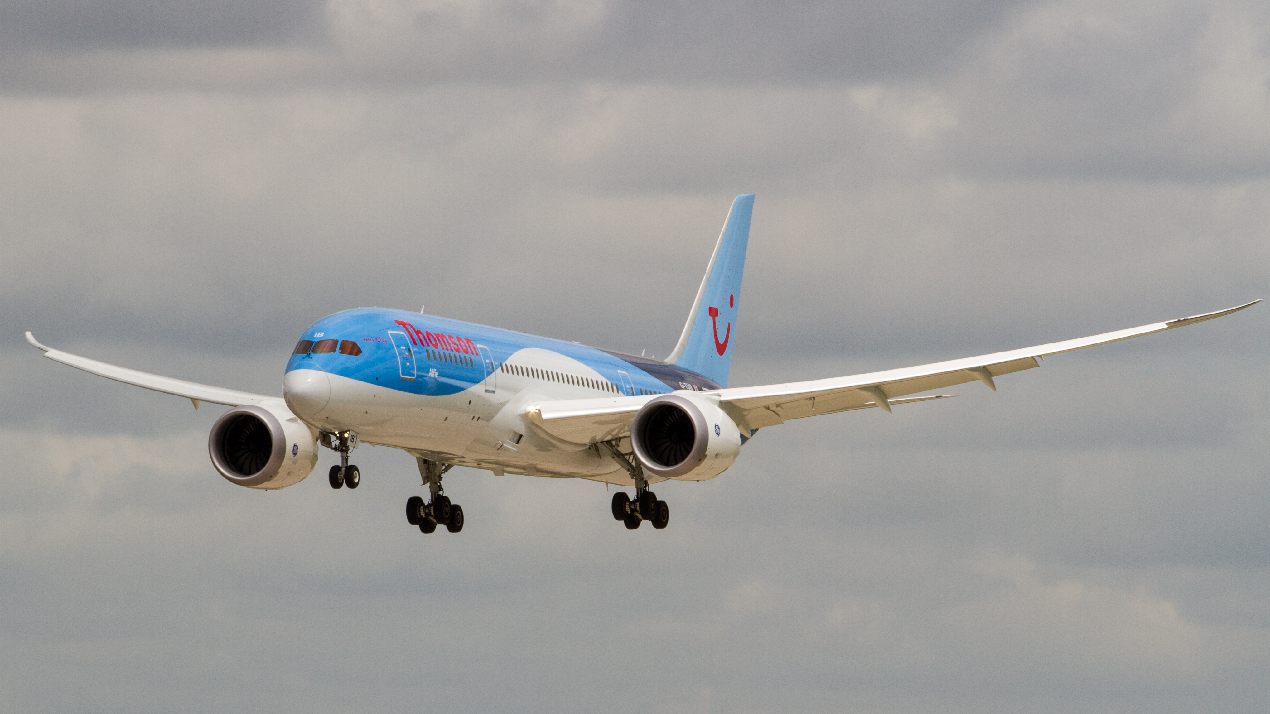 Manchester 24.06.13.